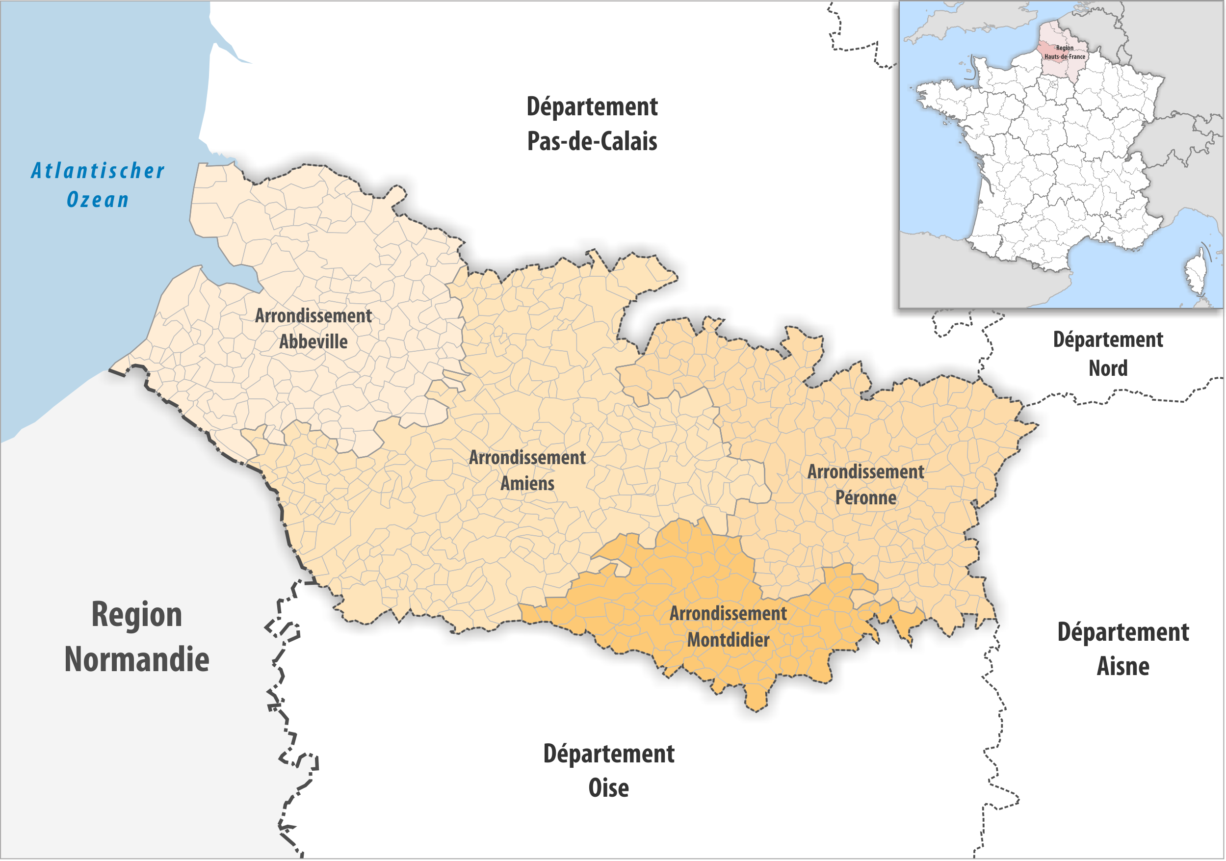 Gemeinden und Arrondissemente im Departement Somme